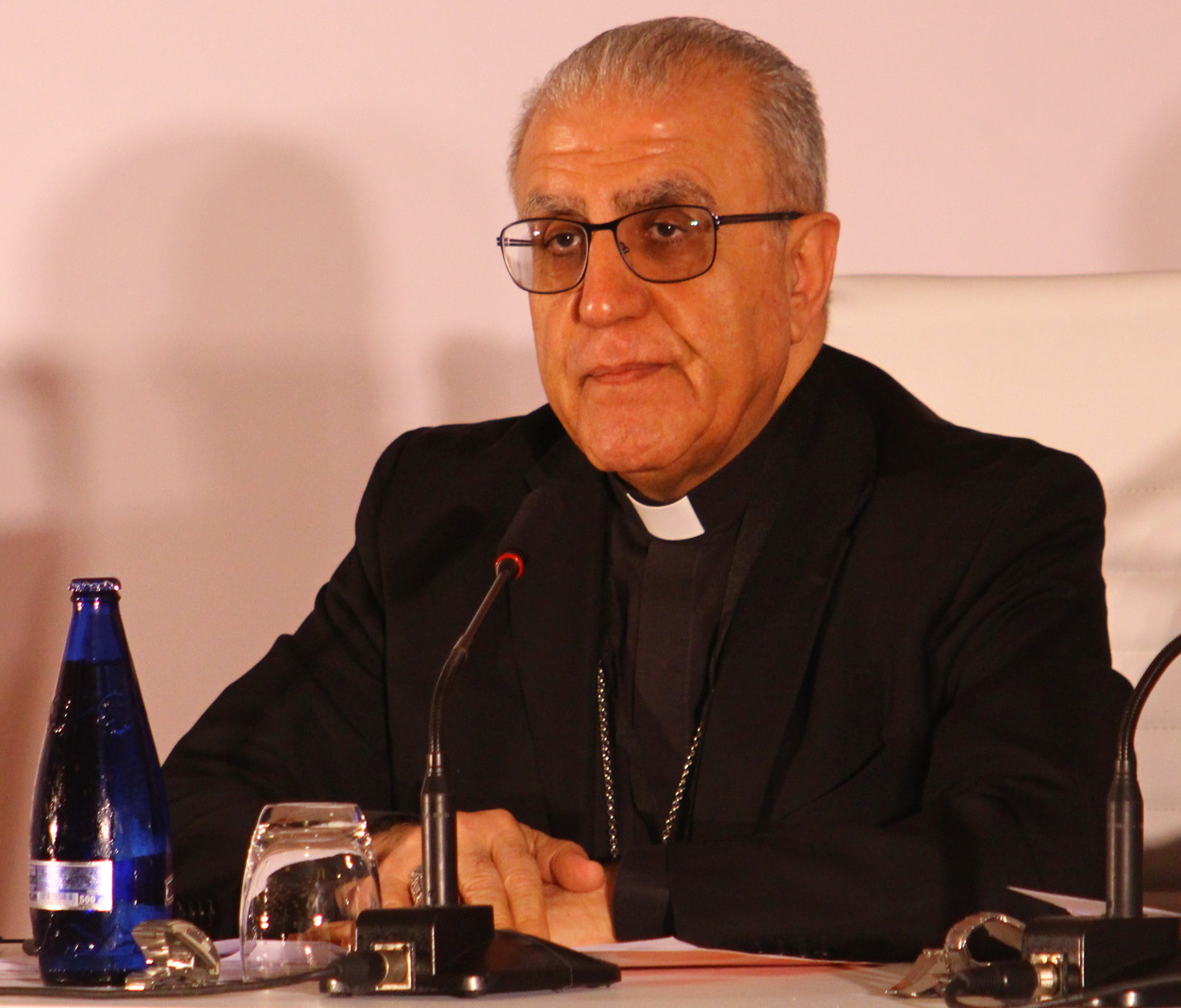 Mgr Yousif Thomas Mirkis lors d'une conférence sur « la persécution des chrétiens d'Orient » le 18 avril 2015.